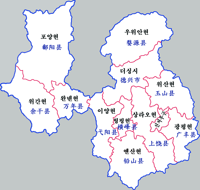 상라오시 현급행정구역